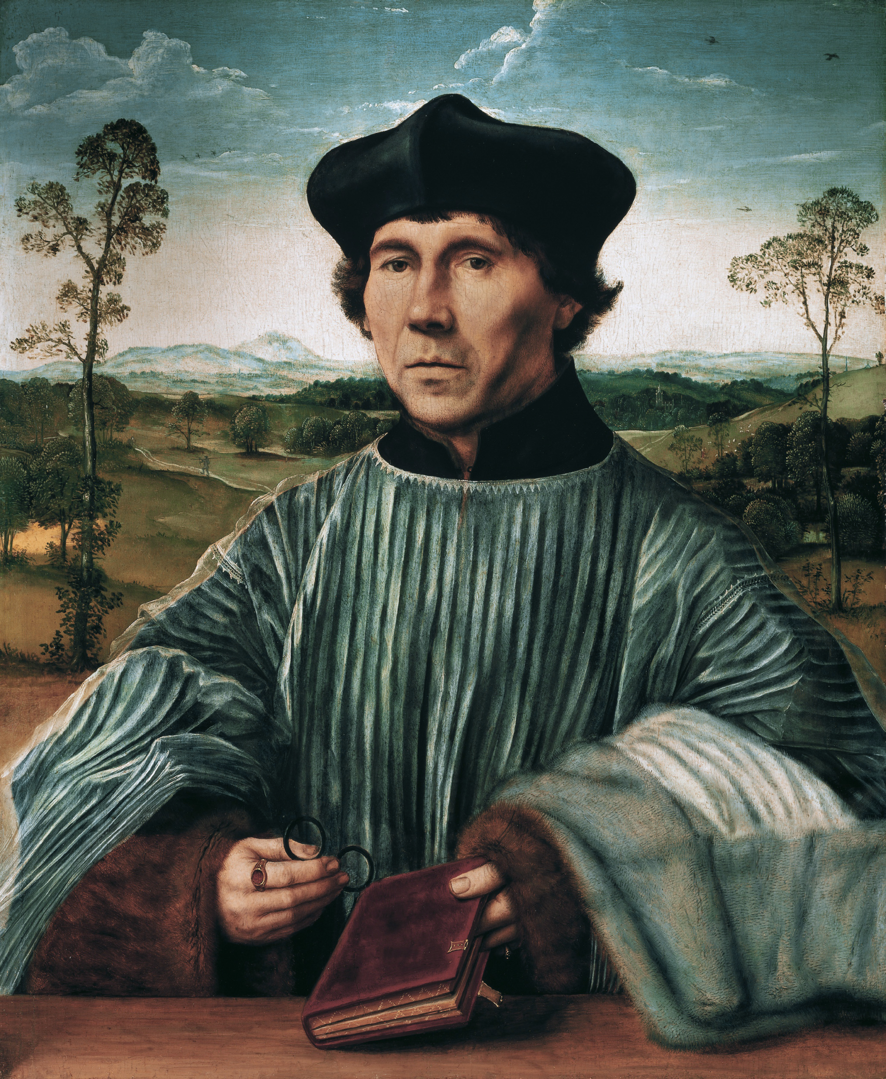 Über dem Arm eine Almutia aus Fehfell, die Umrandung aus Verrücken, der Rest Fehwamme. Unter dem Chorgewand Ärmelabschlüsse aus einer Marderart, vielleicht Nerzfell.